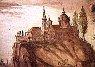 Santuario Madonna del Soccorso, Ossuccio (From a fresco in Chapel XIV of the Sacro Monte).jpg